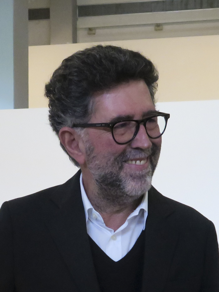 Manuel Valente Alves